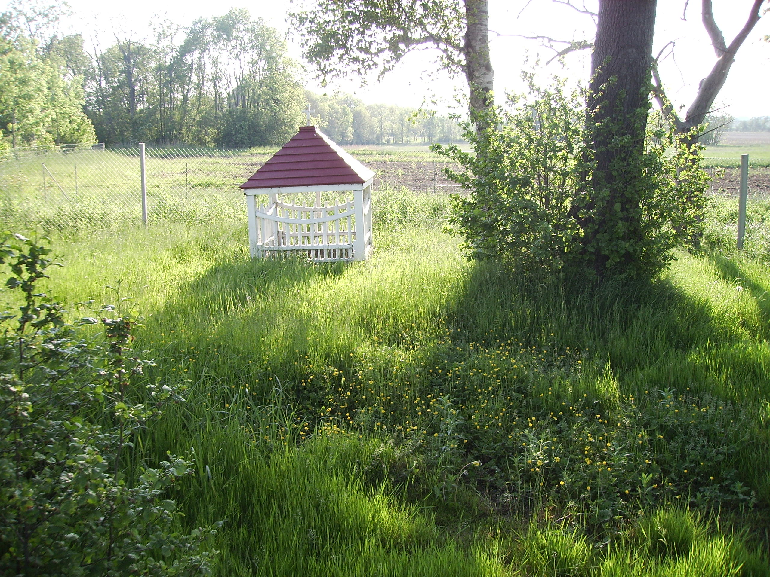 Hole Kilde, Fraugde Sogn, Åsum Herred, Odense Amt, Denmark (Spring in Denmark)